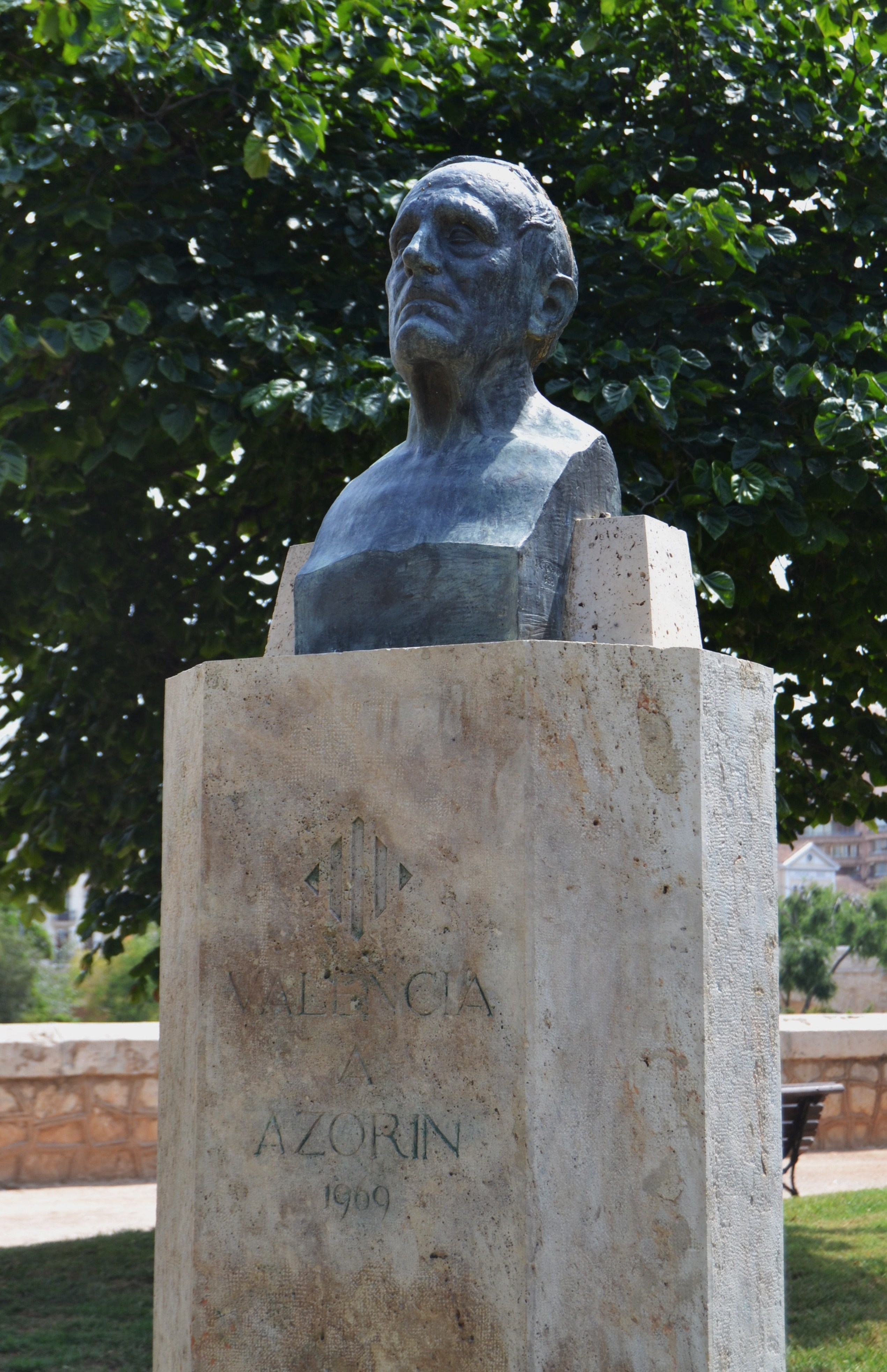 València a Azorín.